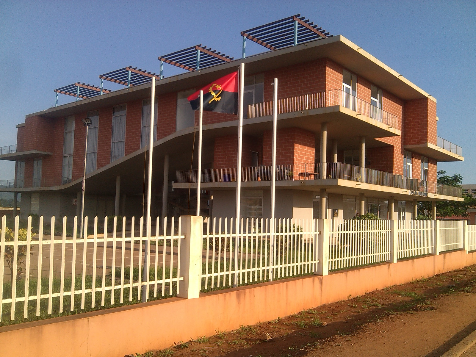 Foto da casa da Juventude na cidade de N'dalatando, fotografado pelo fotógrafo criativo Mitendo Moisés...